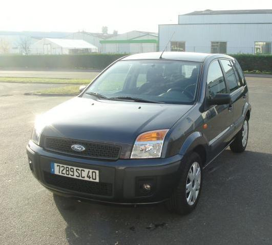 Ford Fusion 1.6 16V essence